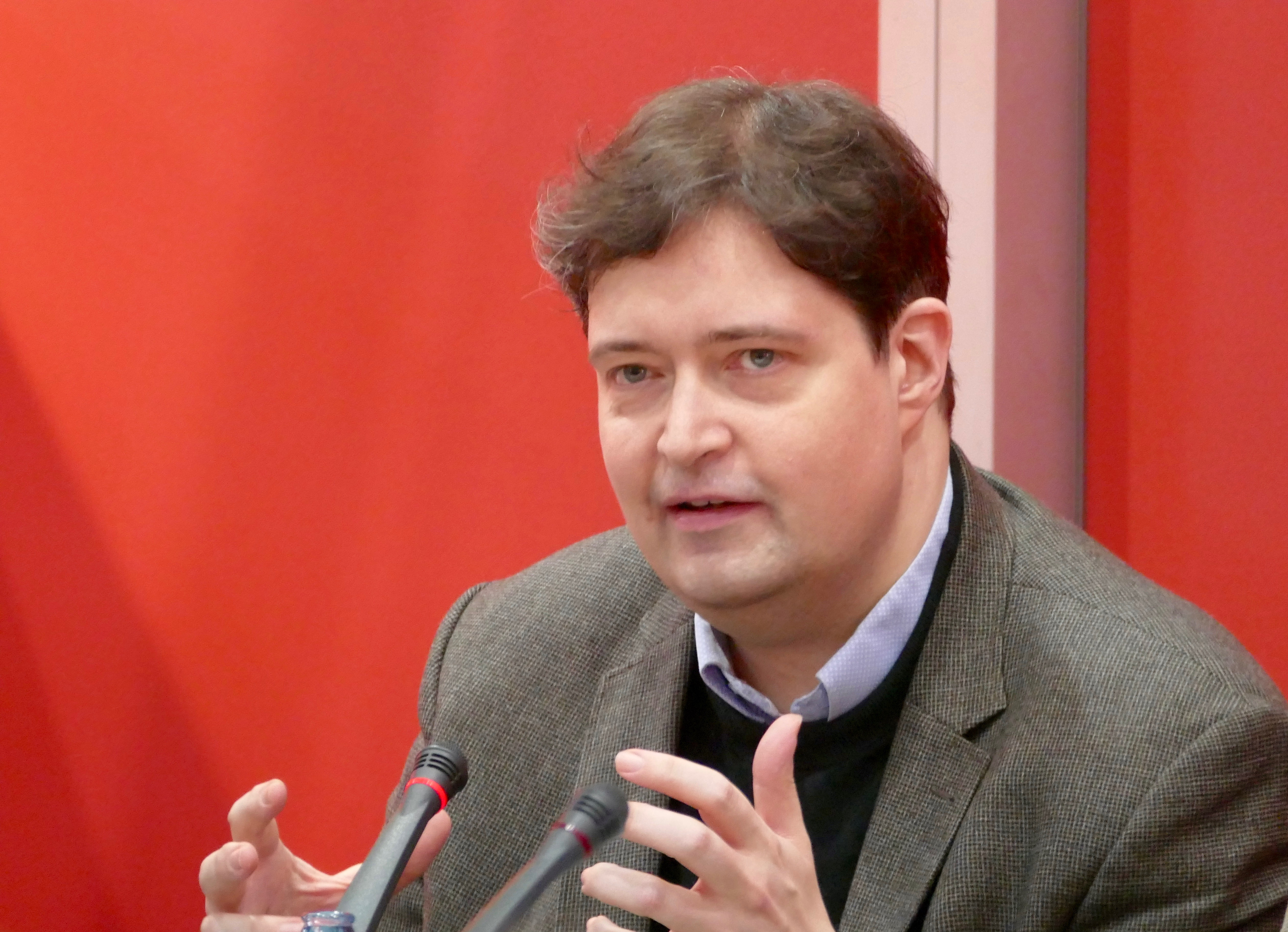 Leonhard Horowski spricht über sein für den Preis der Leipziger Buchmesse nominiertes Sachbuch " Das Europa der Könige"